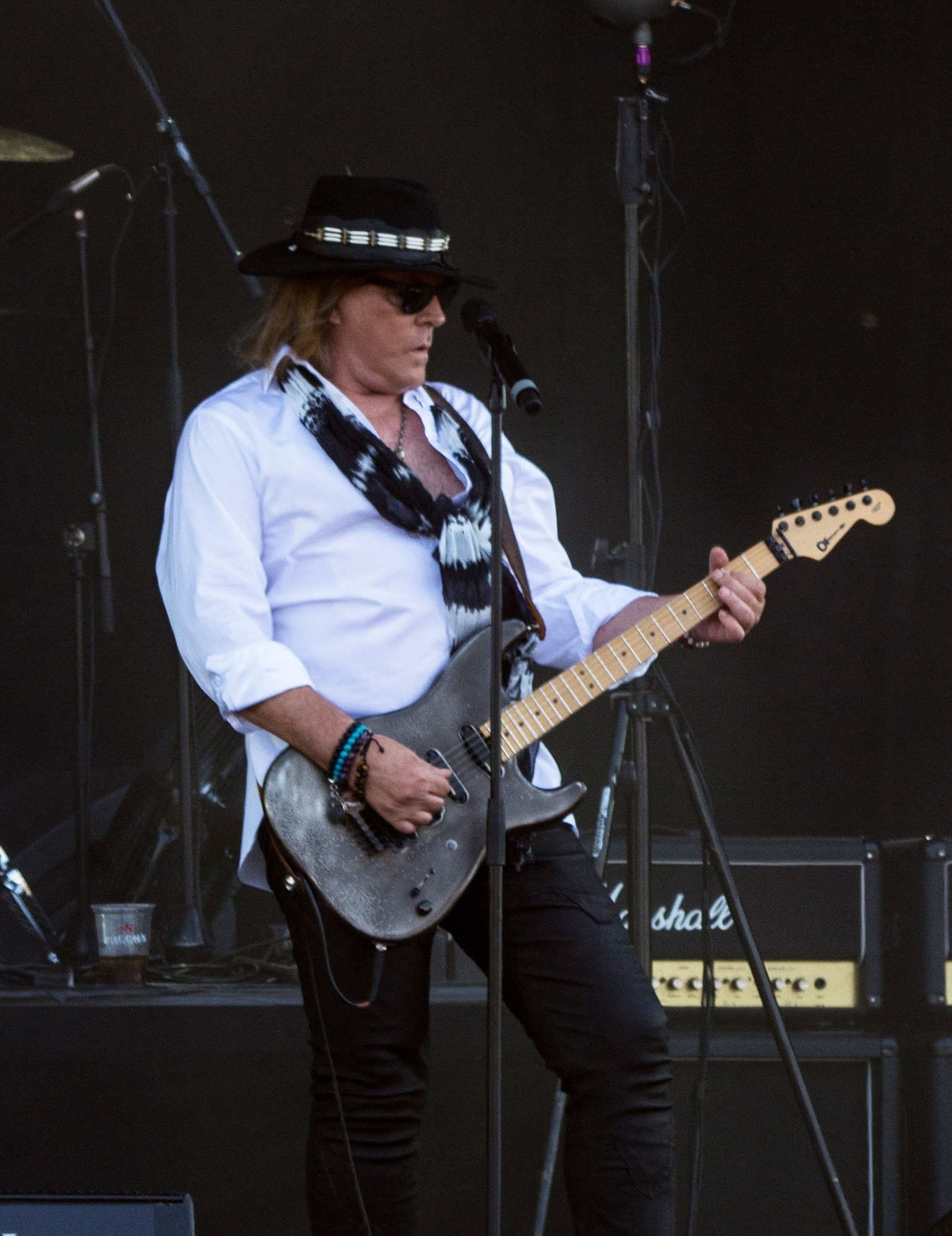 Dokken beim Wacken Open Air 2018